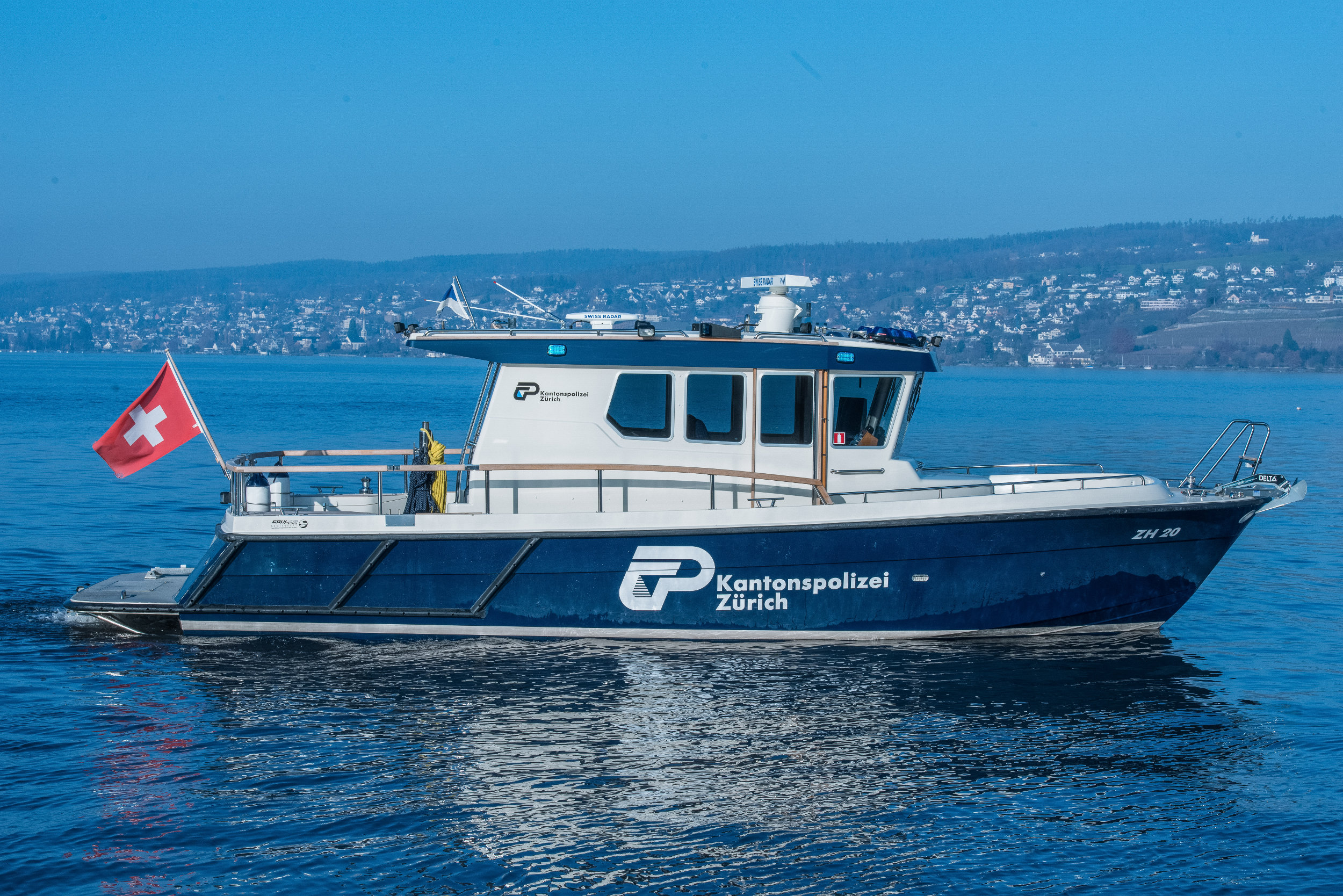 Eines der Schiffe der Kantonspolizei Zürich, das im Stützpunkt der Seepolizei in Oberrieden stationiert ist.